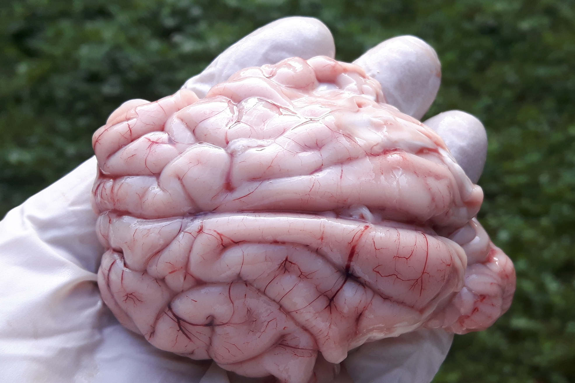 Das etwa zwei Stunden nach der Erlegung entnommene Gehirn eines Rehbocks, von oben betrachtet.